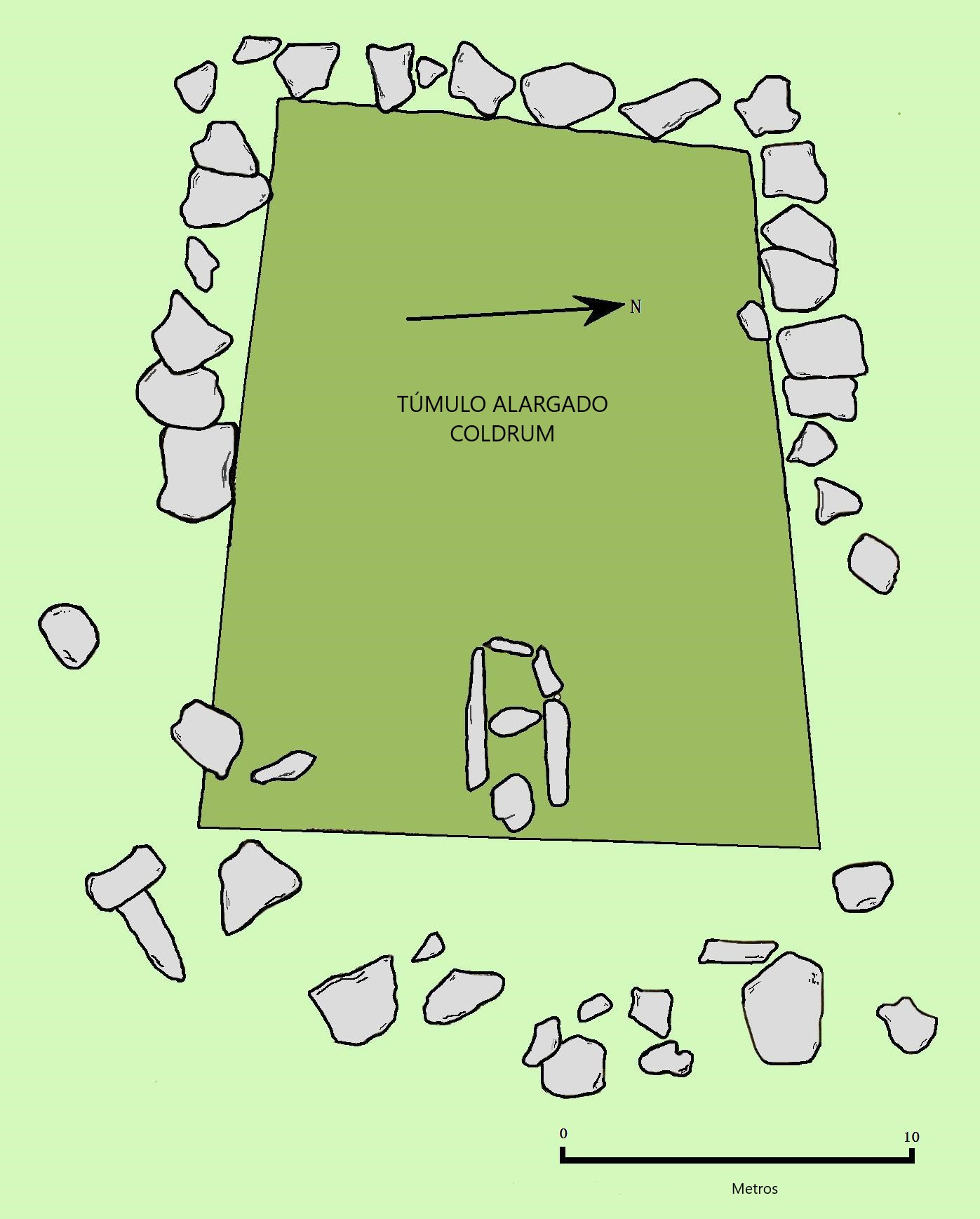 Plano simplificado del túmulo alargado Coldrum